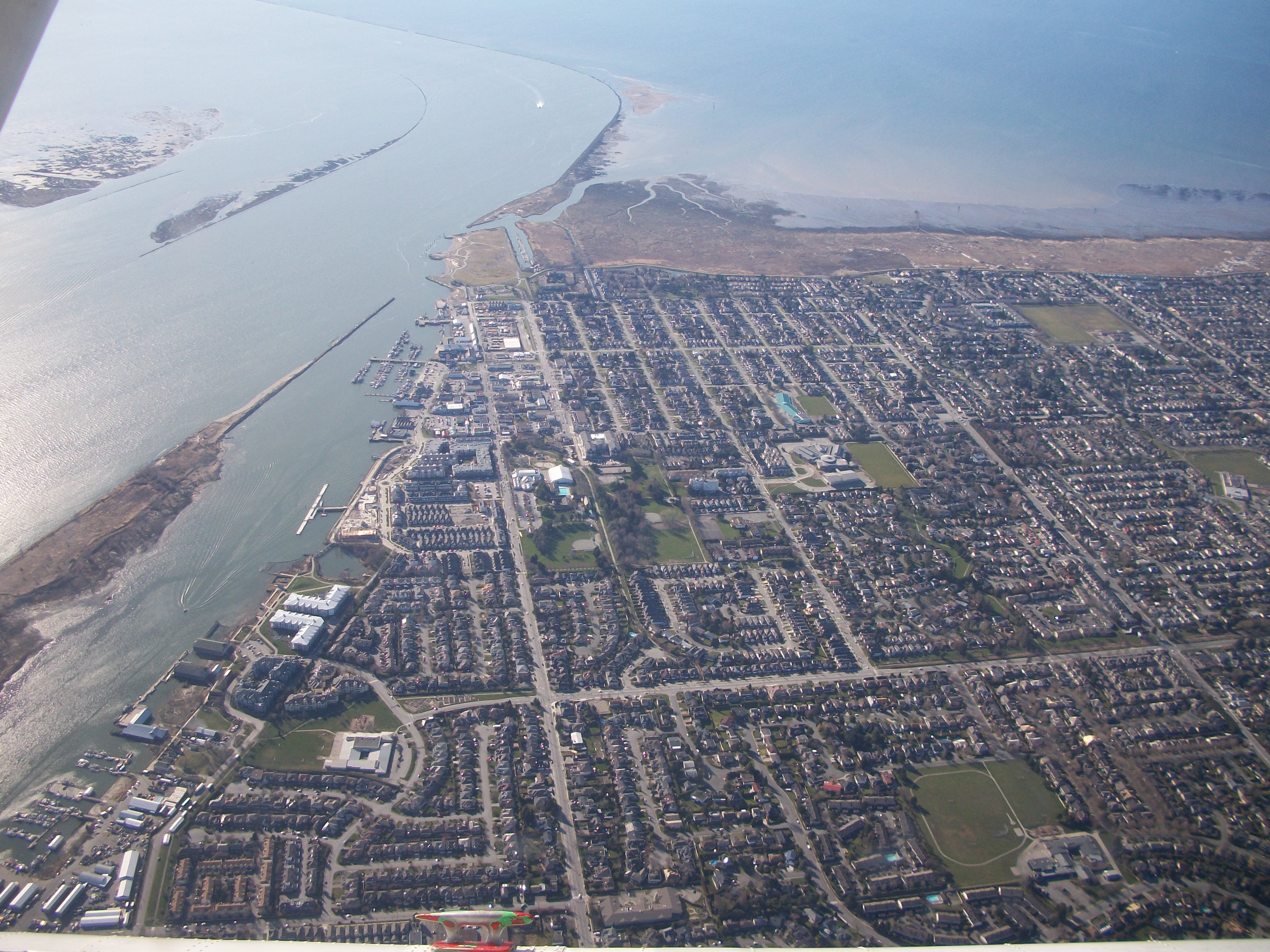 Vancouver